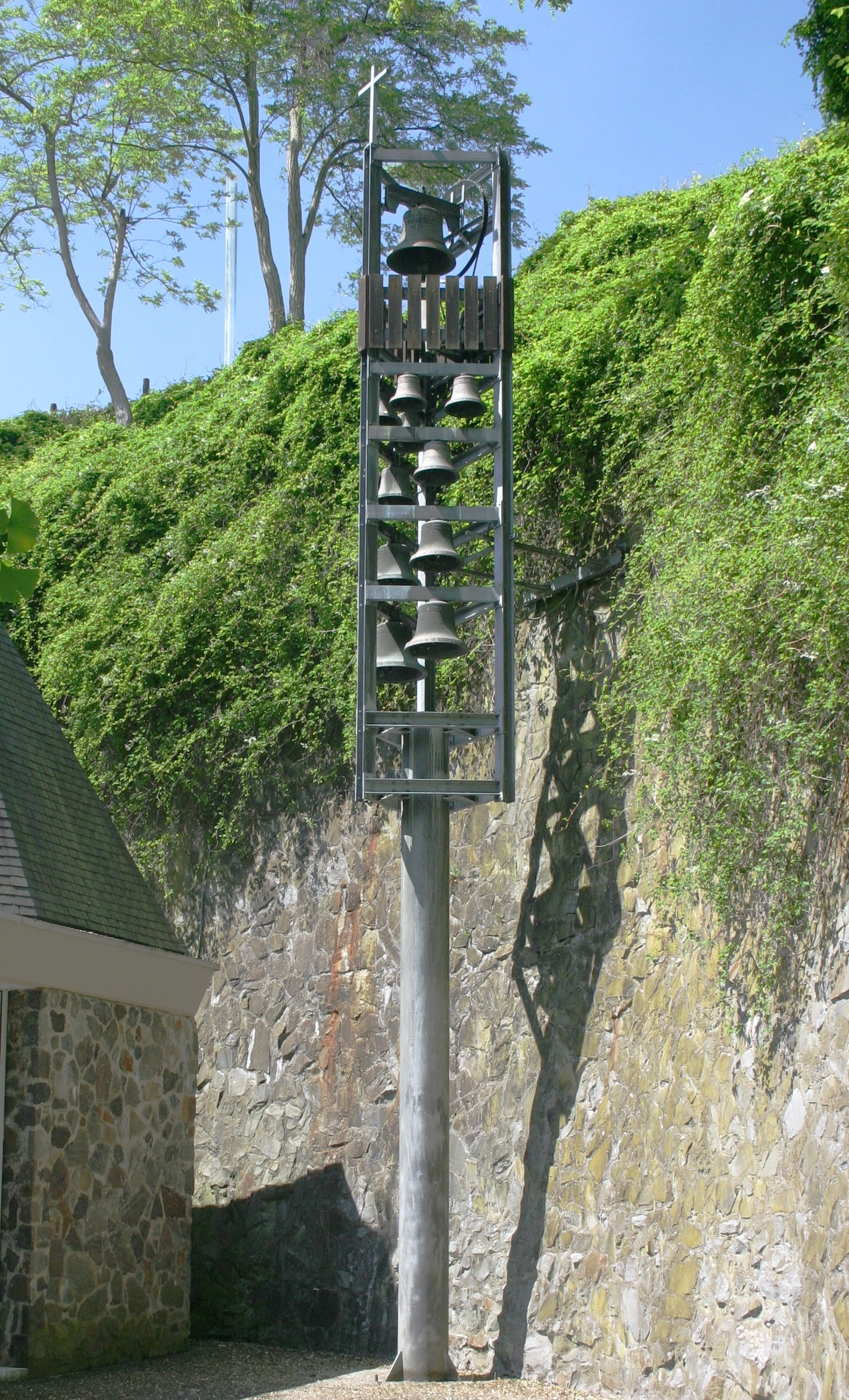 Klackentuerm zu Valkenburg an der Halschent vum Cauberg.